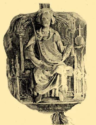 Václav III. - pečeť